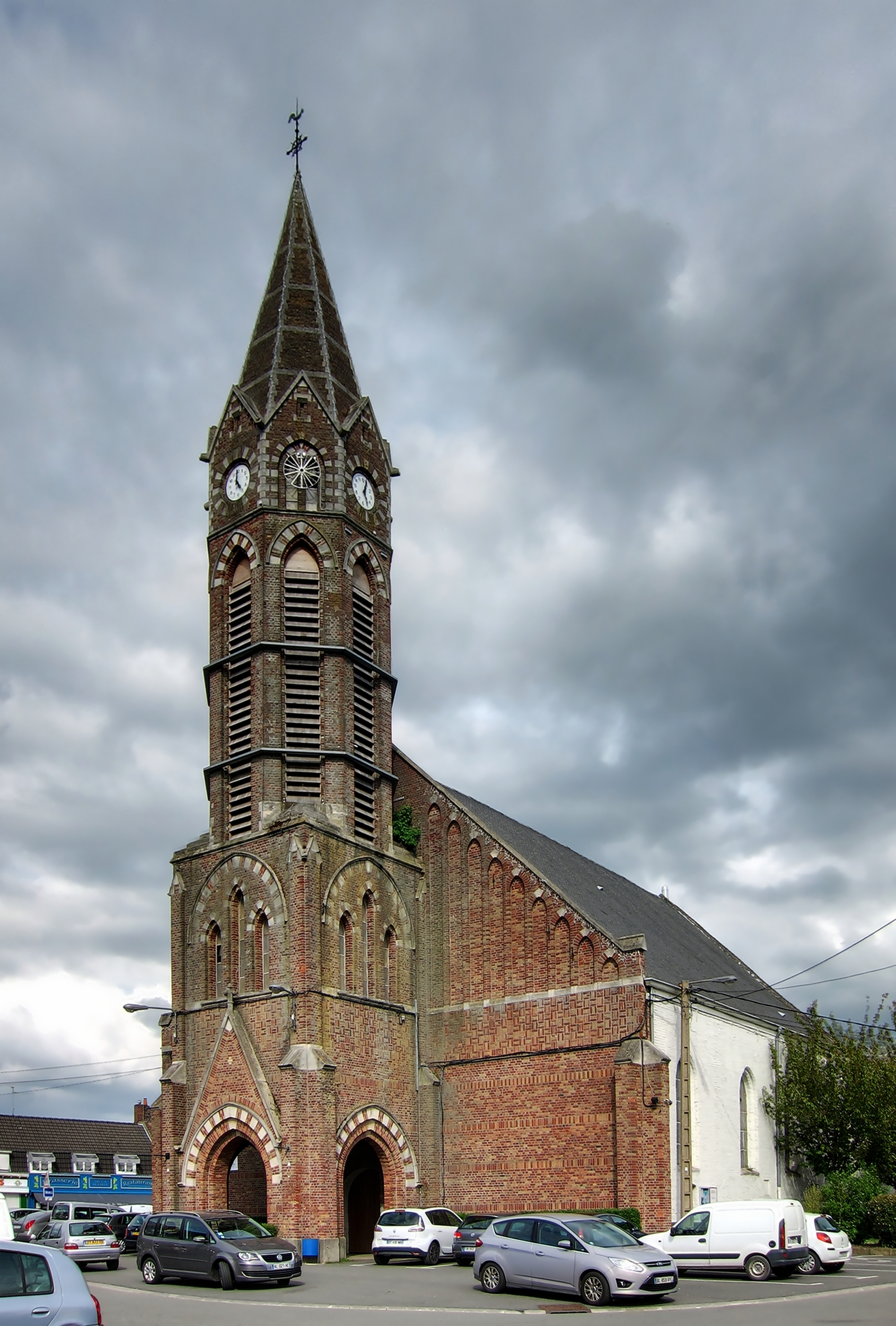 L'église Saint-Corneille de Hem (Nord).